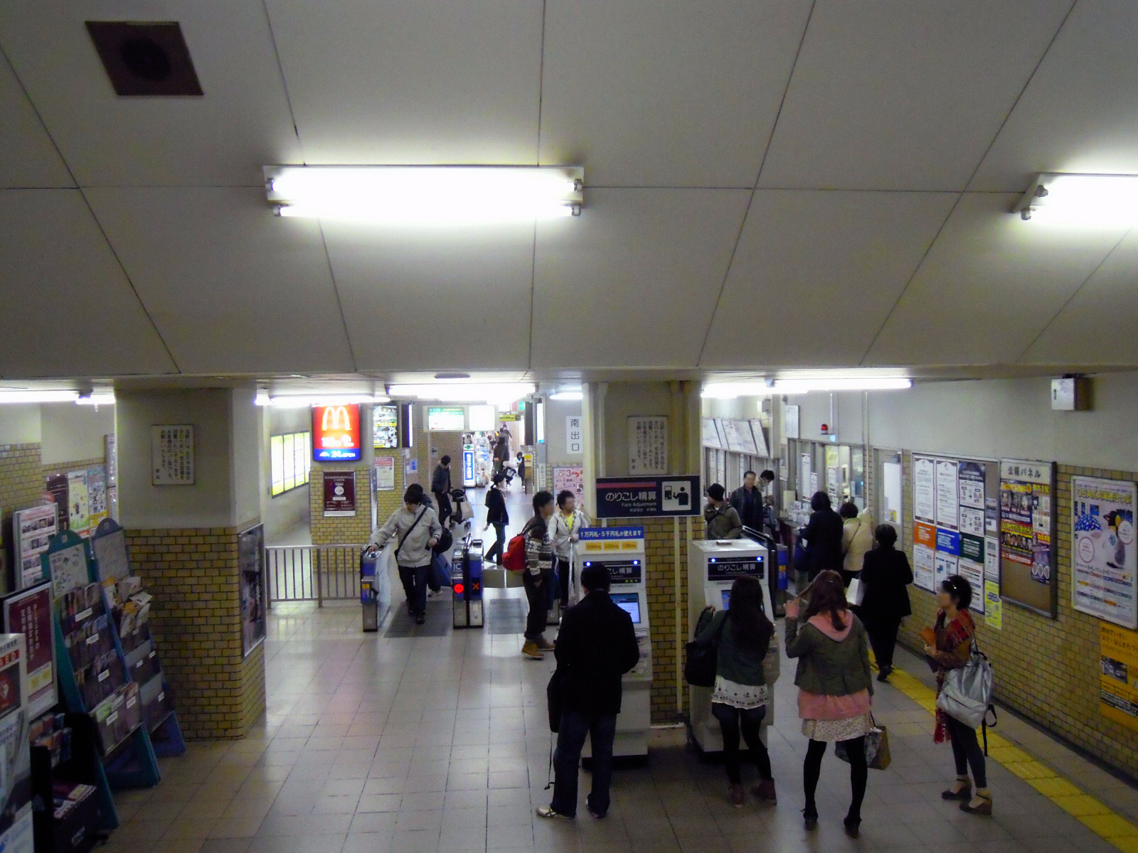 Hankyu Kamishinjo station ticket gate